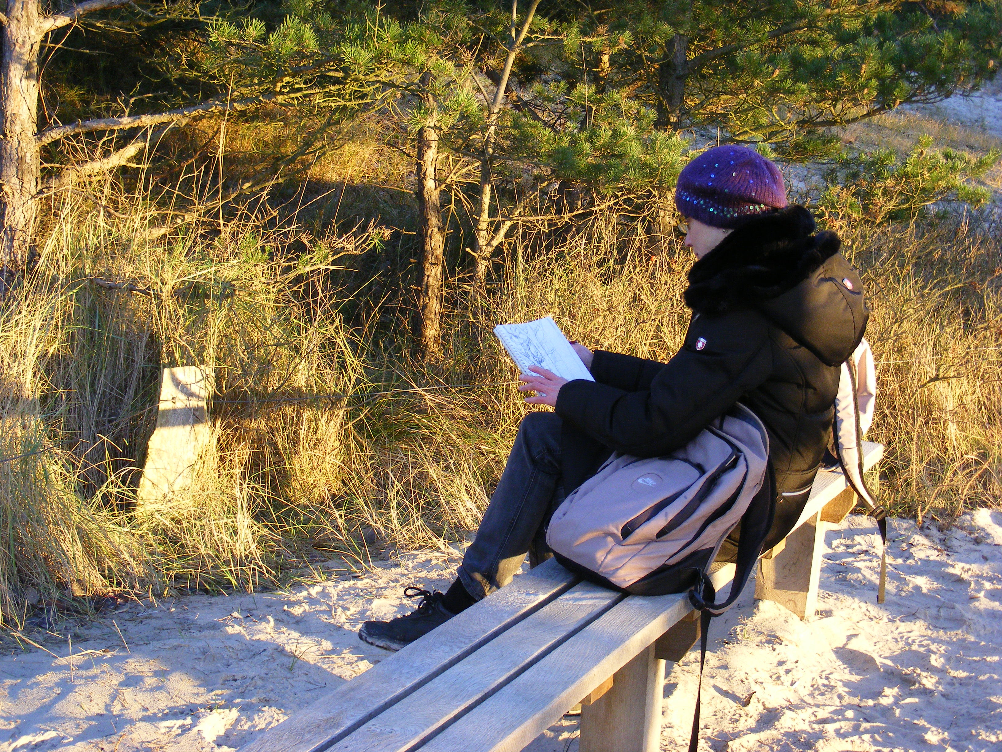 Sandra Rienäcker am Leuchtturm Prerow